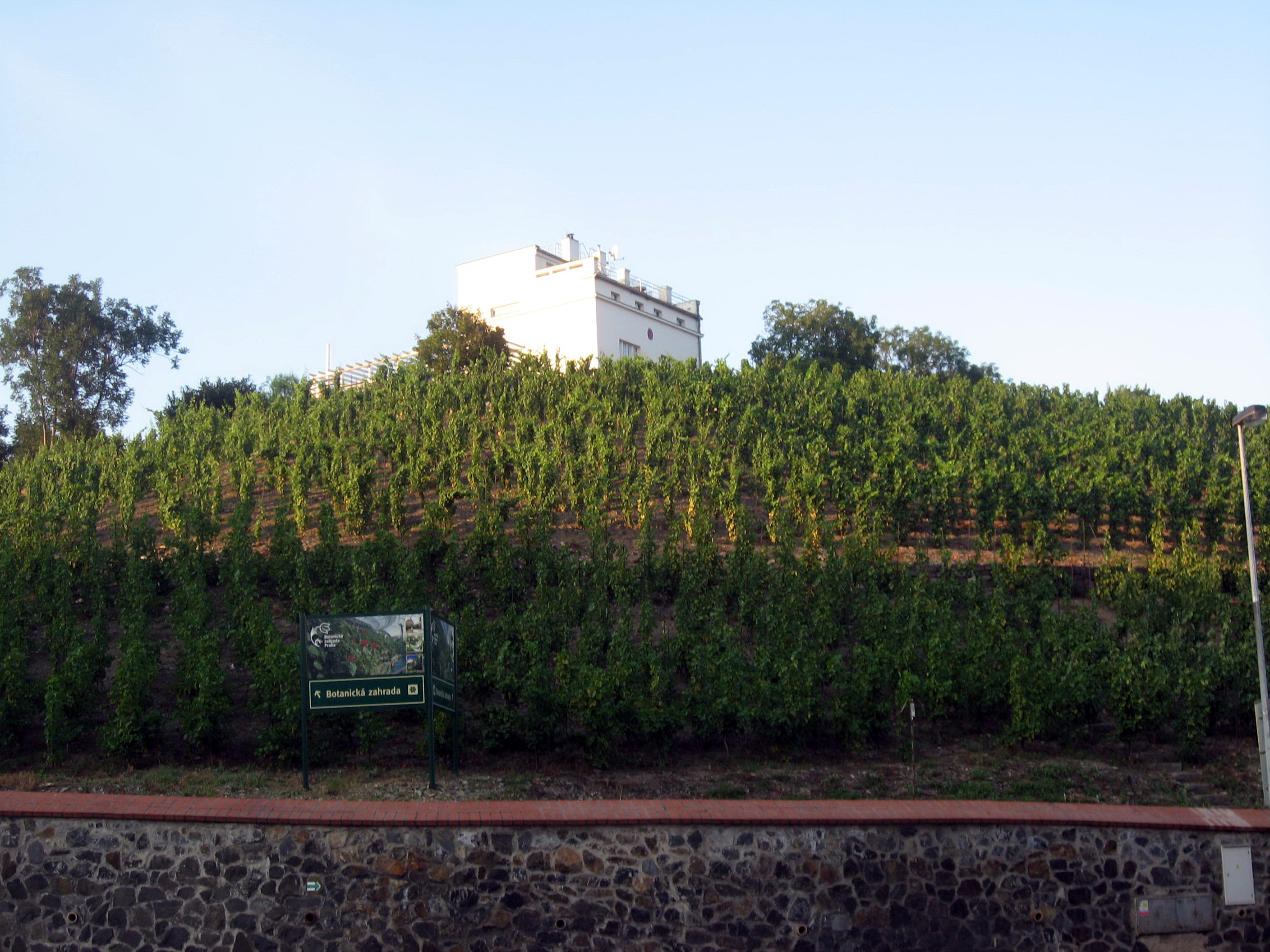 Troja, vinice svaté Kláry